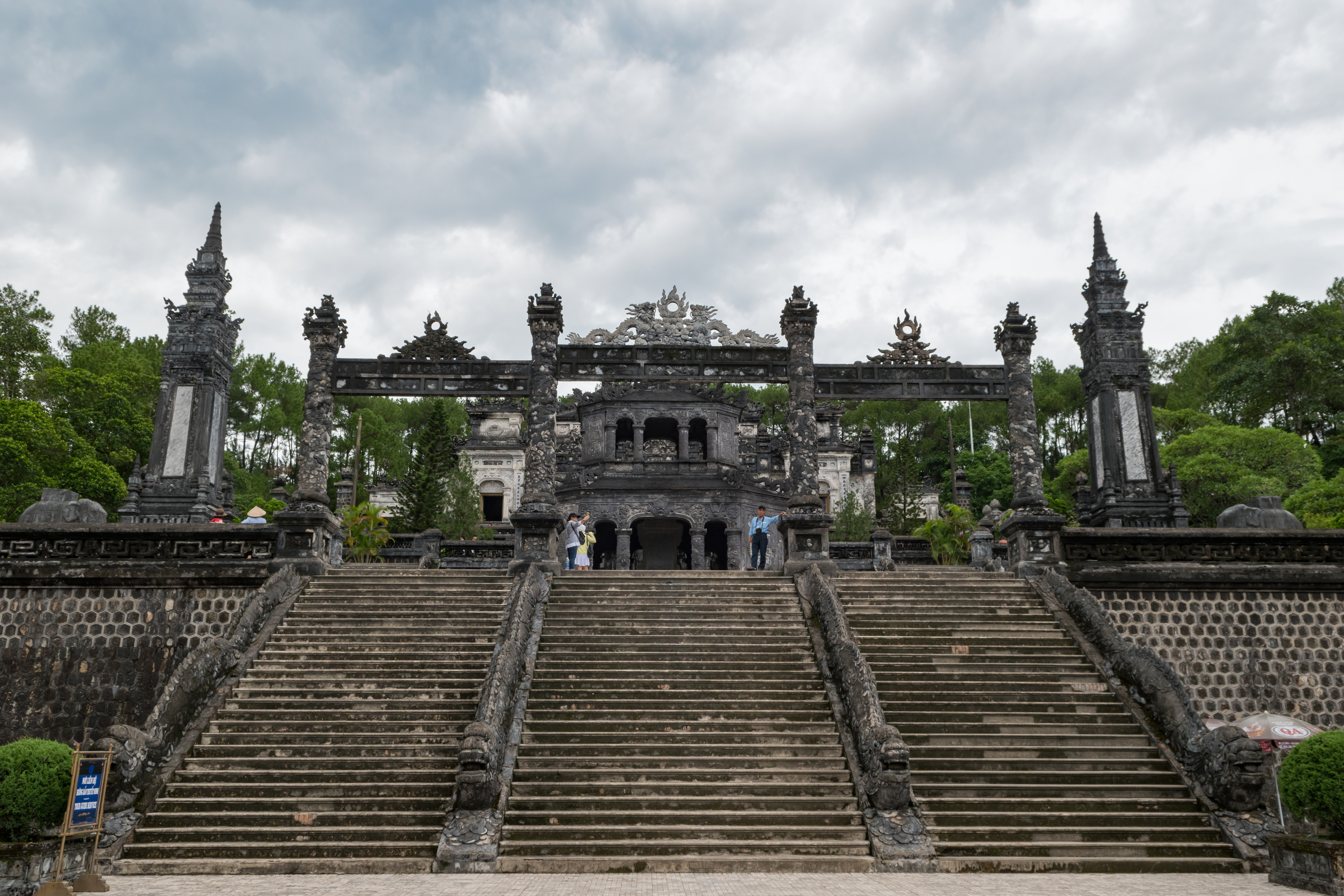 Khai Dinh tomb Hue Vietnam Saigon